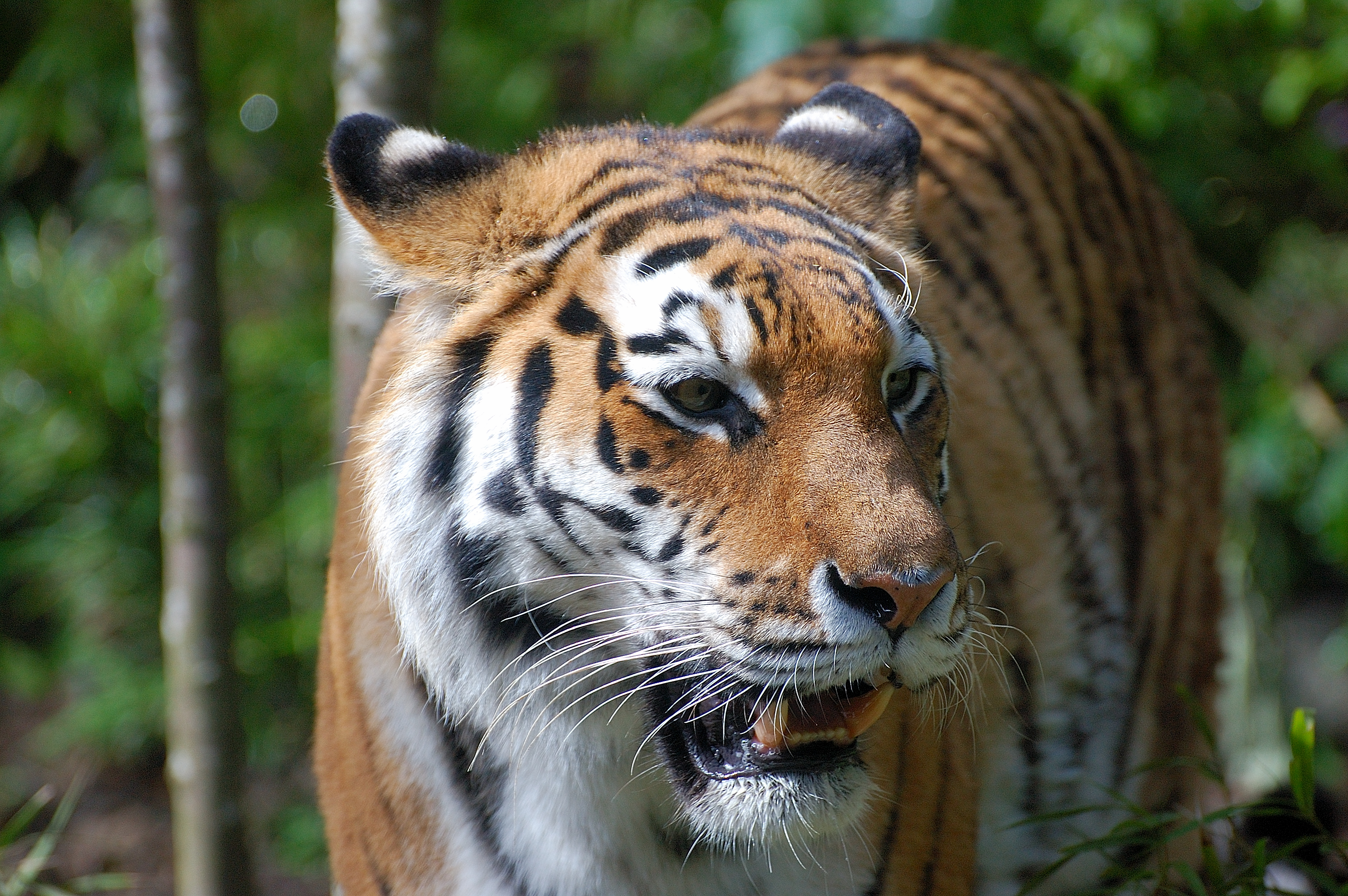 Amur tiger